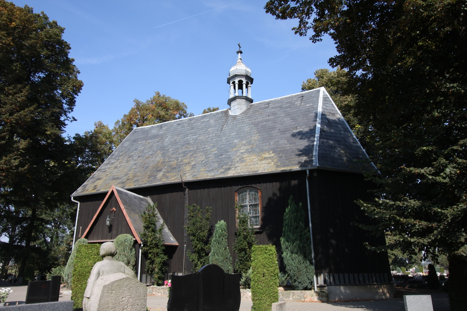 Wielichowo, kościół cmentarny p.w. Narodzenia NMP, drewn., 1793